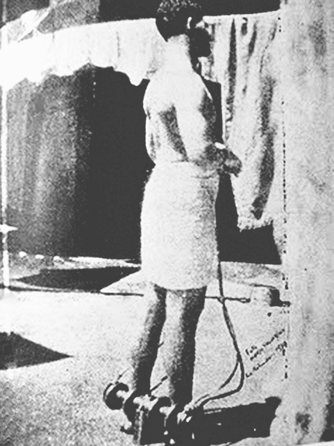 El cadete Armando Chávez, preso en la cárcel "La Rotunda" de Caracas, Venezuela, por motivos políticos, portando perno y grilletes de 75 libras.